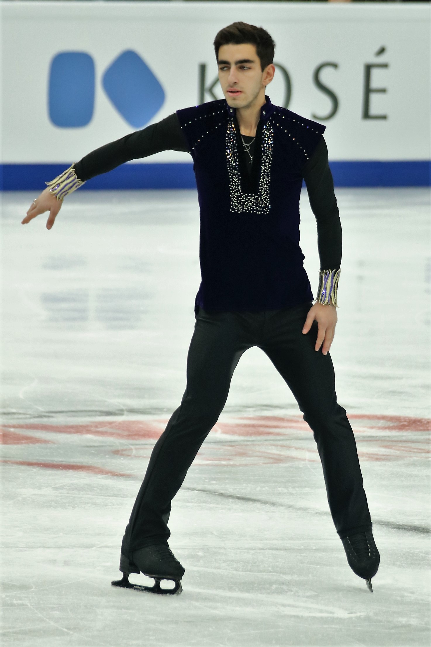 Славик Айрапетян (Армения) на Чемпионате Европы по фигурному катанию 2018.